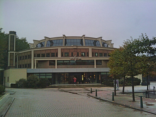 Hoofdkantoor woningcorporatie Stichting Vestia Groep, Kruisplein Rotterdam